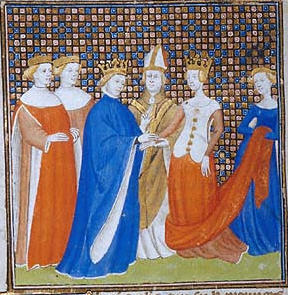 Svatba Filipa I. a Berty Hollandské